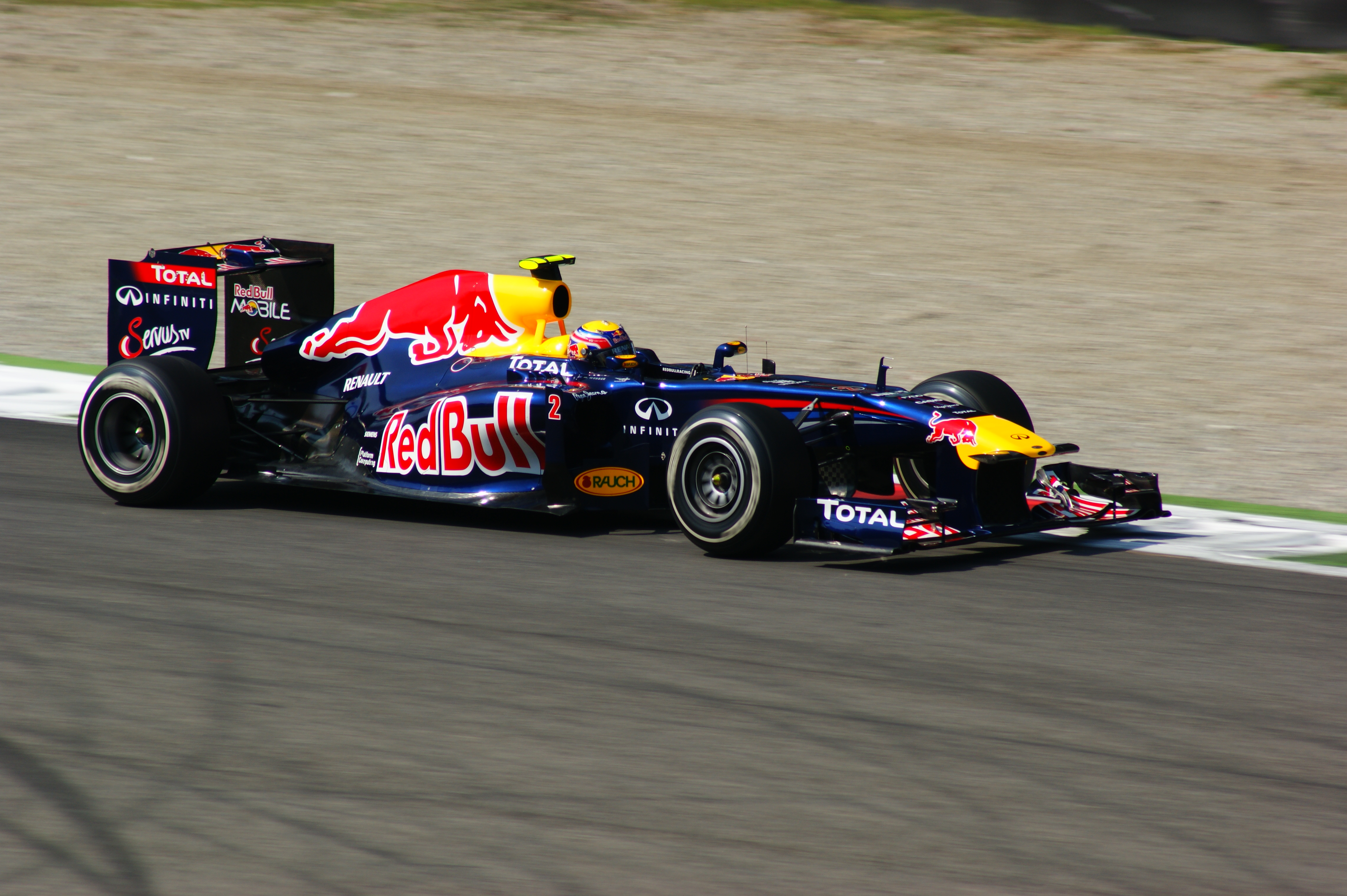 Mark Webber alla variante della roggia Monza 2011